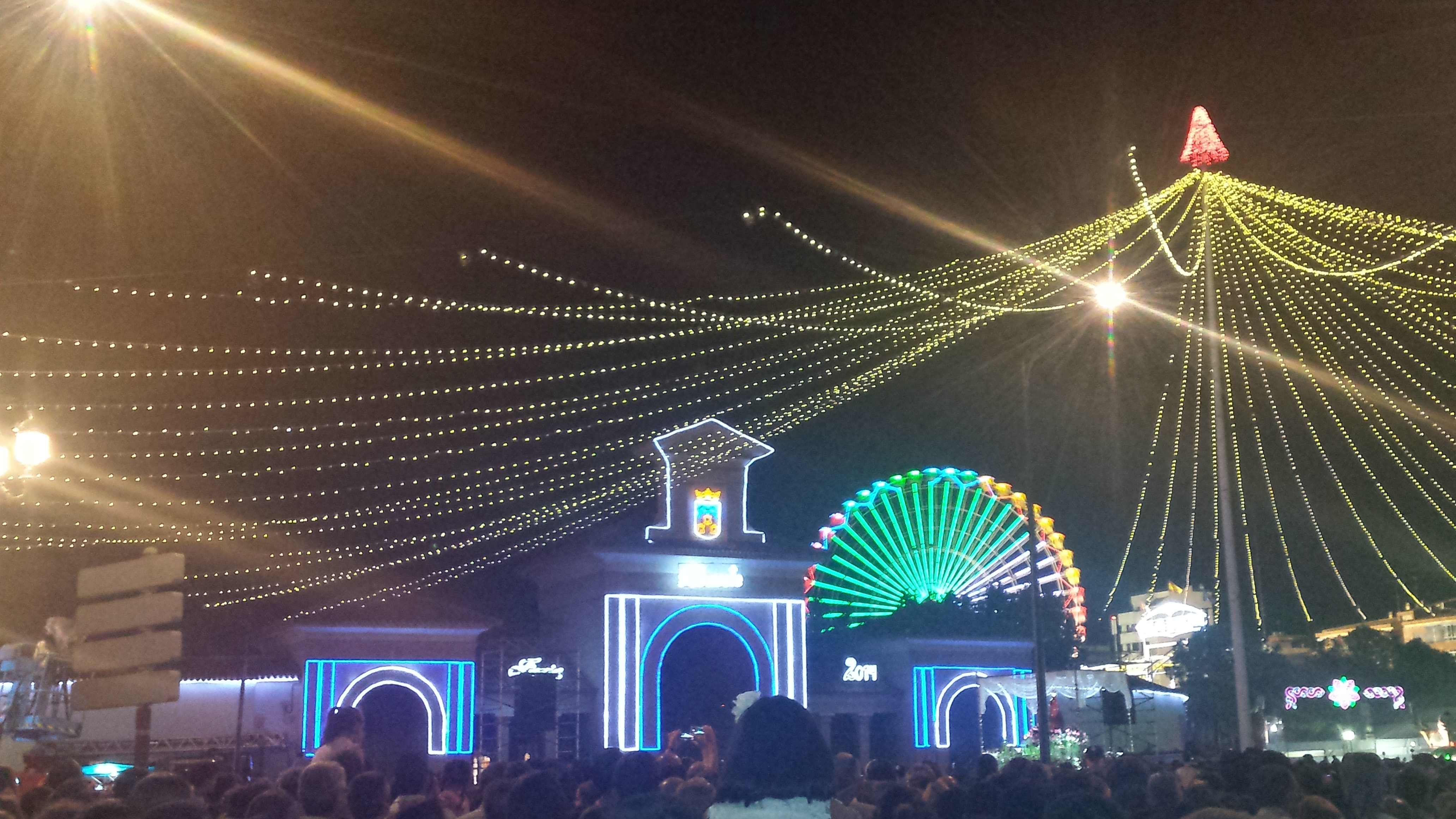 Feria de Albacete 2014. Puerta de Hierros del Recinto Ferial de Albacete. Pincho de la Feria.